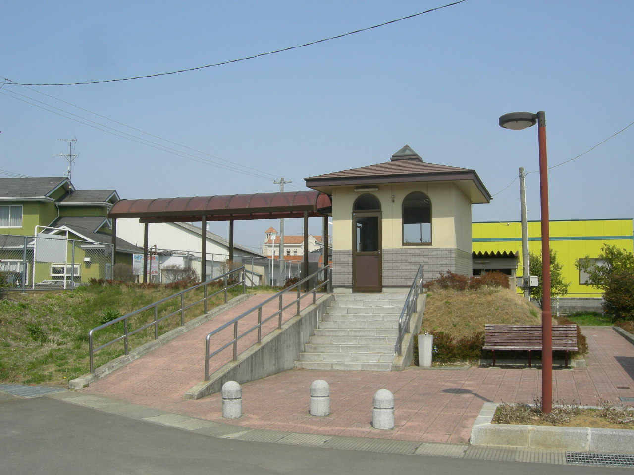 JR石巻線曽波神駅（Sobanomaki station,JR Ishinomaki line）